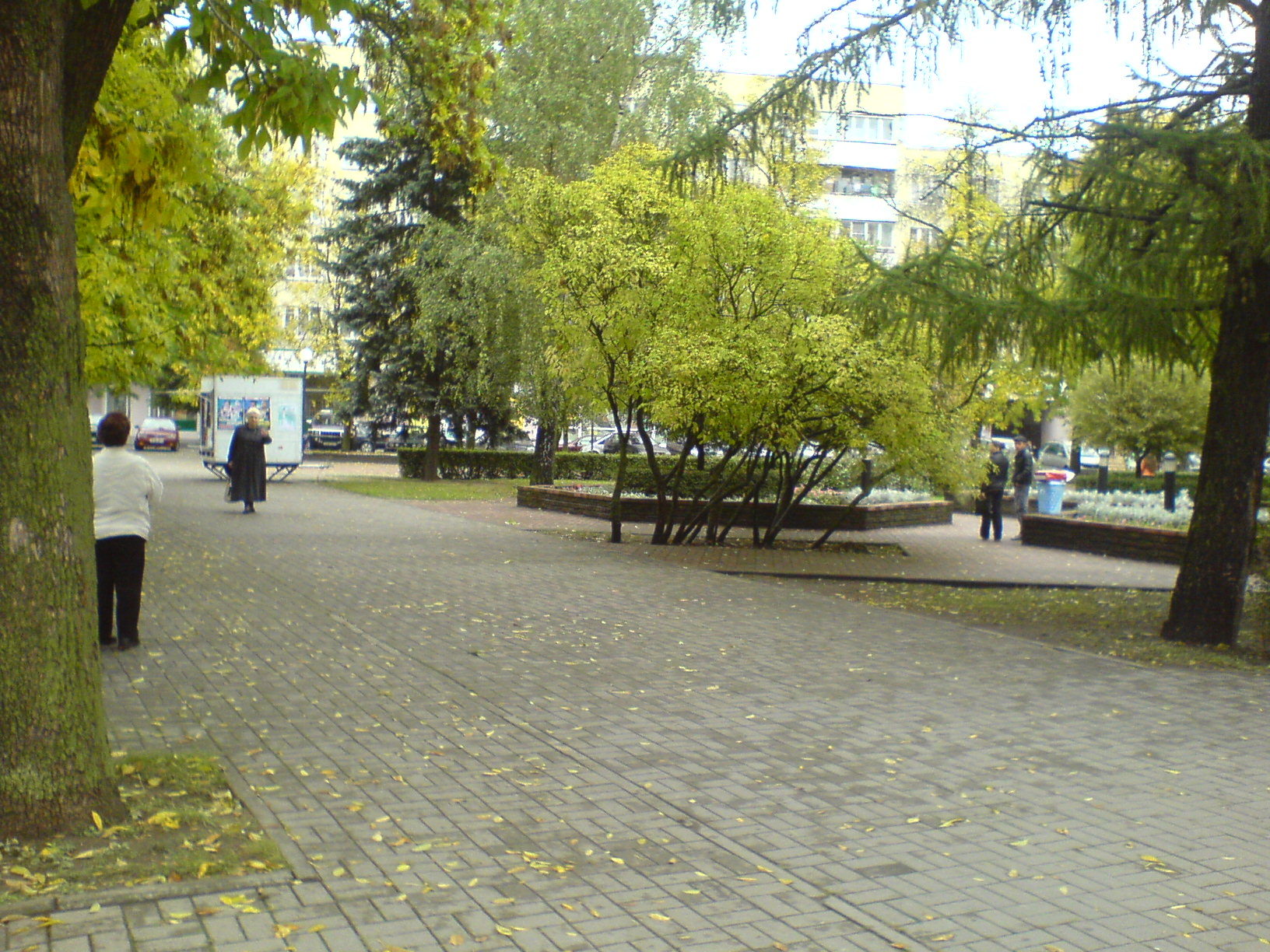 Lieninski District, Mogilev, Belarus